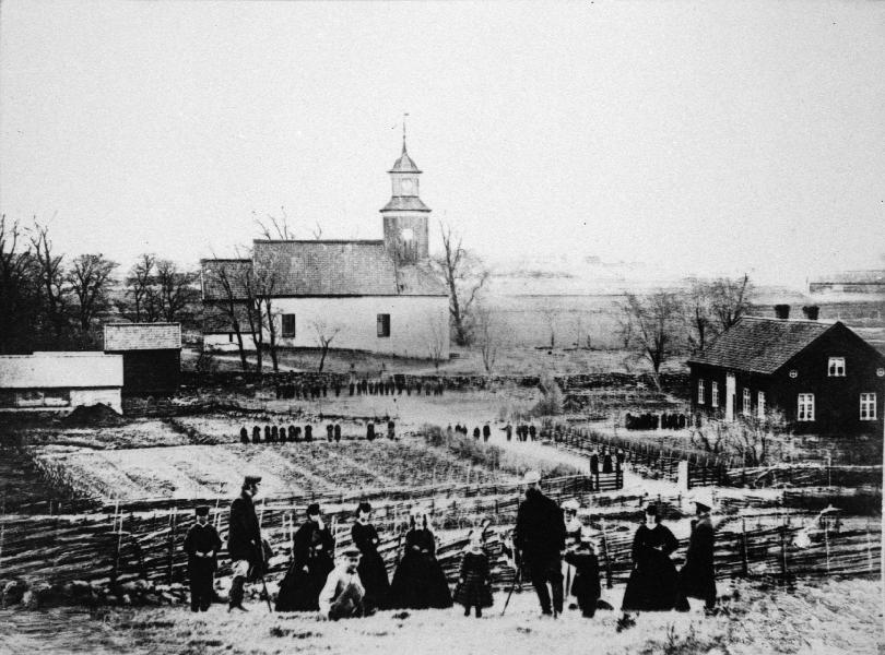 Kyrkan från söder.